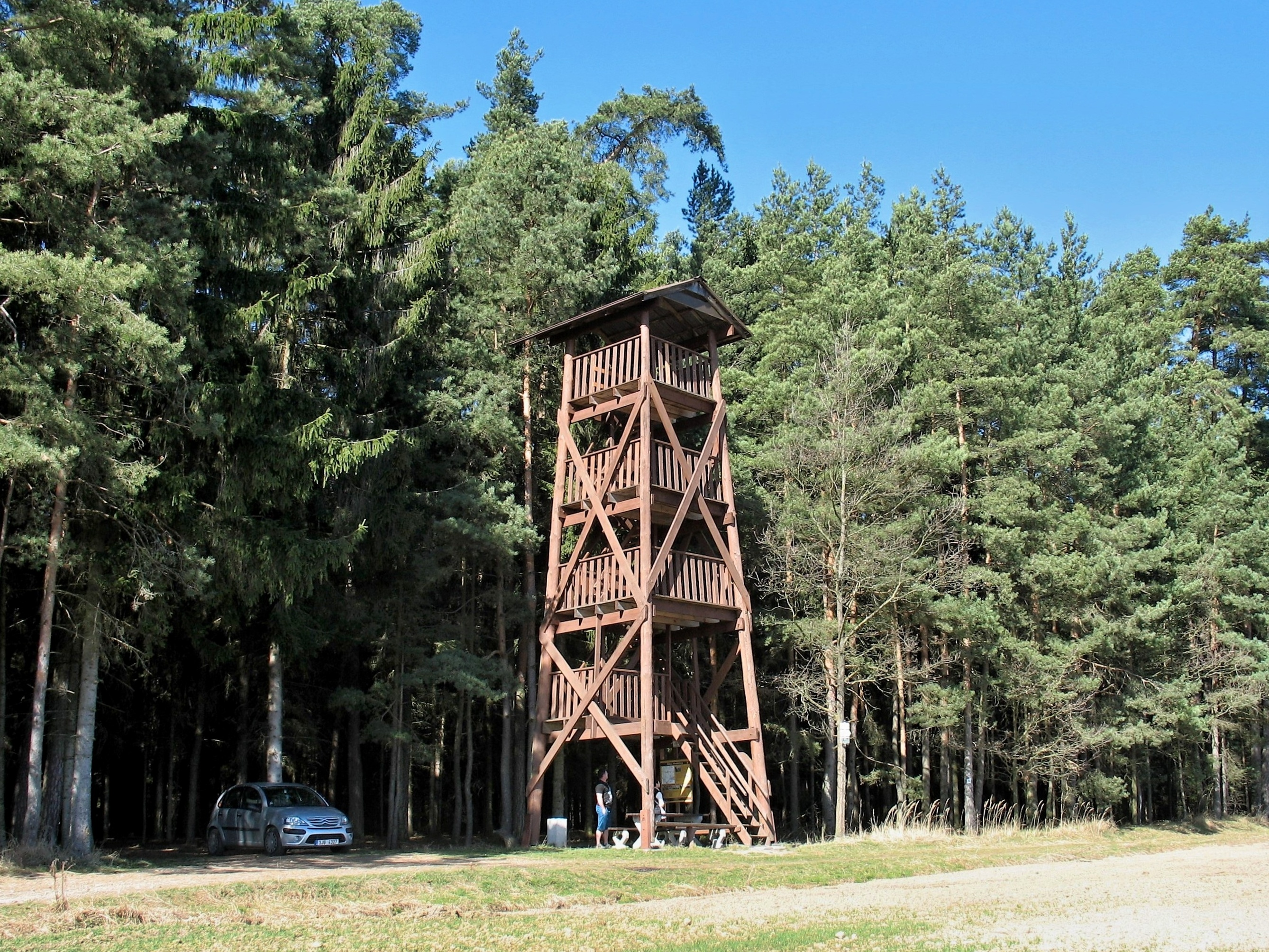 Rozhledna u obce Radětice nedaleko Bechyně (okres Tábor)